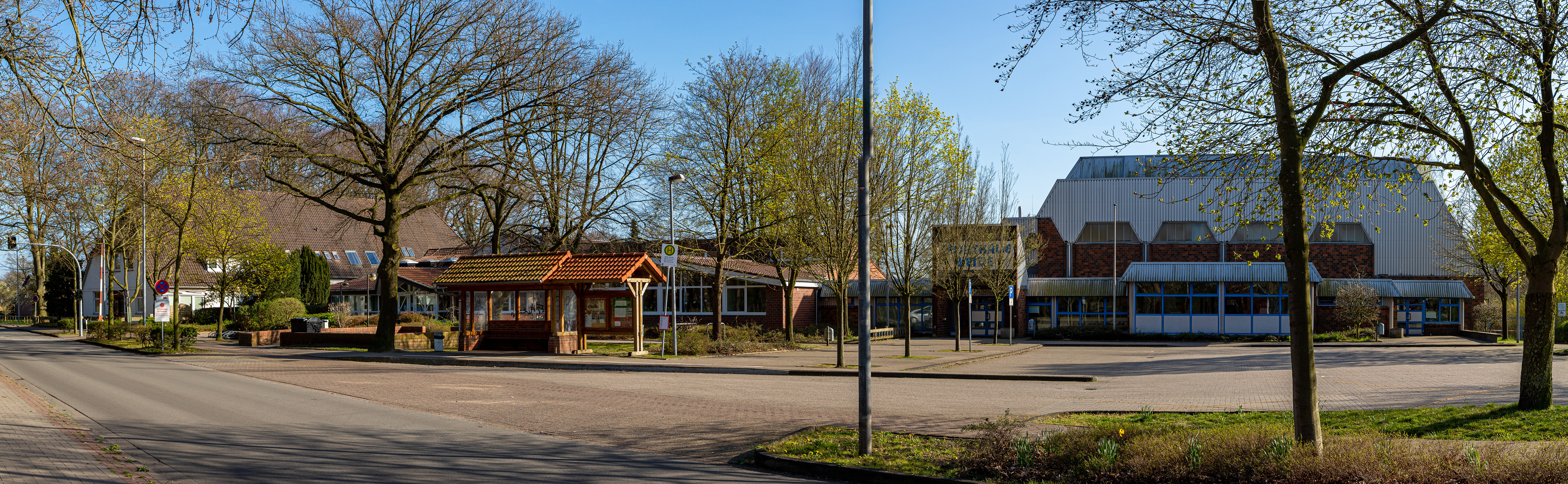 Die Grundschule Heide mit Turnhalle